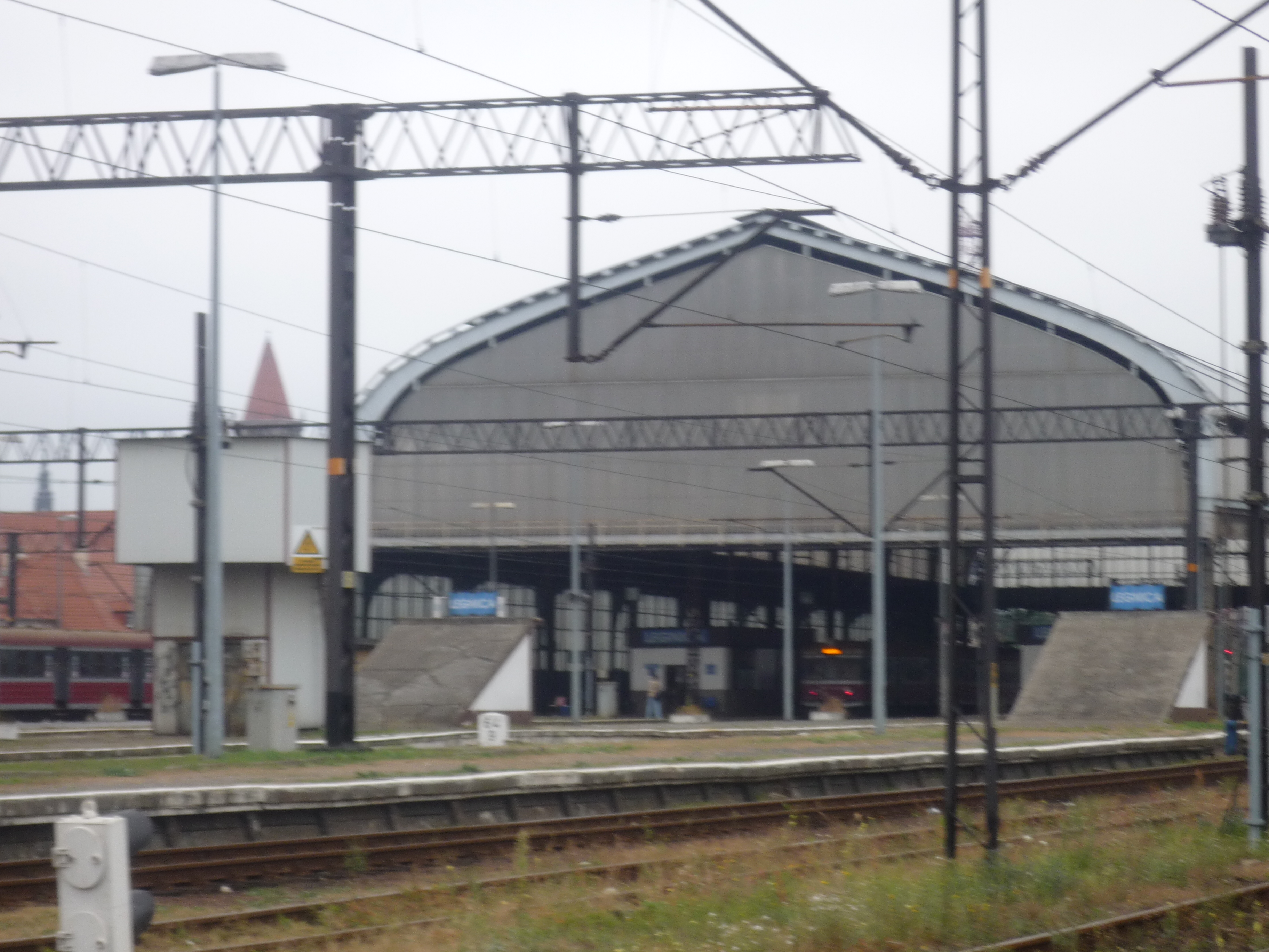 Hala peronowa głównej stacji kolejowej w Legnicy.